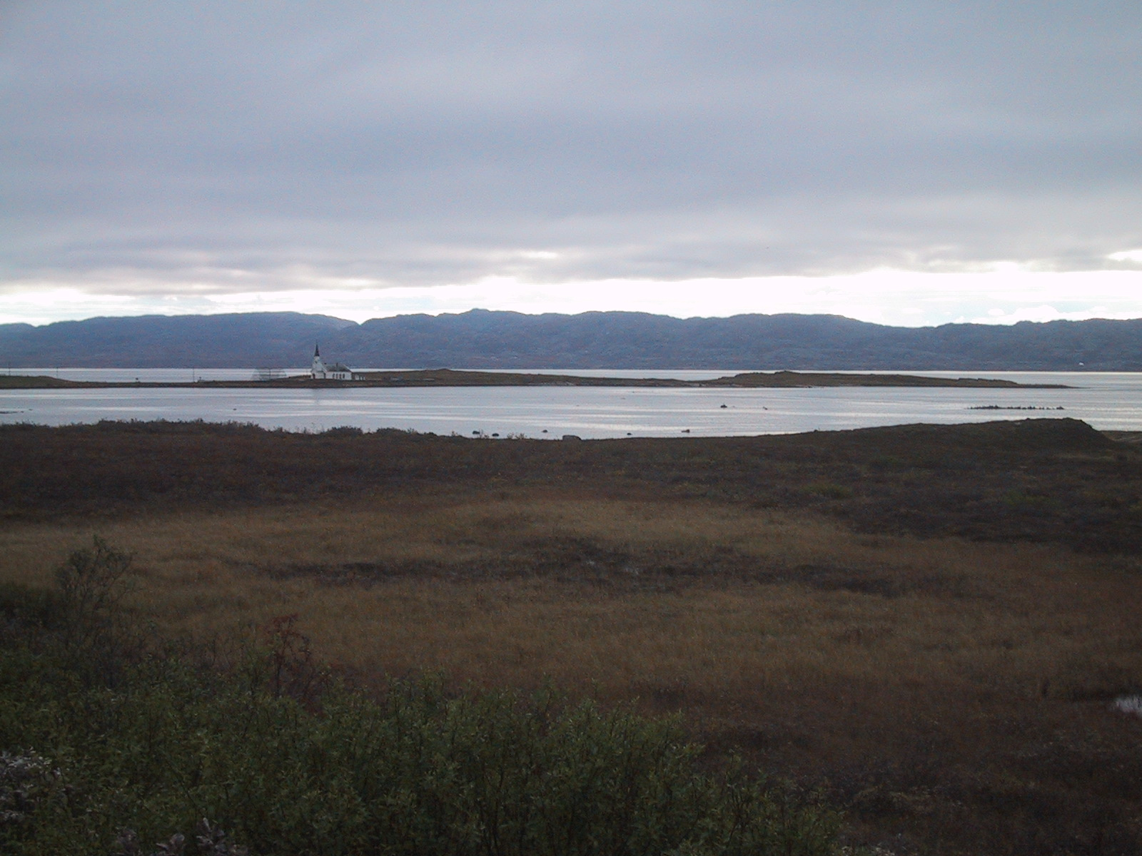 Nesseby kyrkje